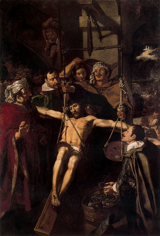 Jerónimo Jacinto Espinosa, El milagro del Cristo del Rescate, óleo sobre lienzo, 243 x 168 cm. Colección particular